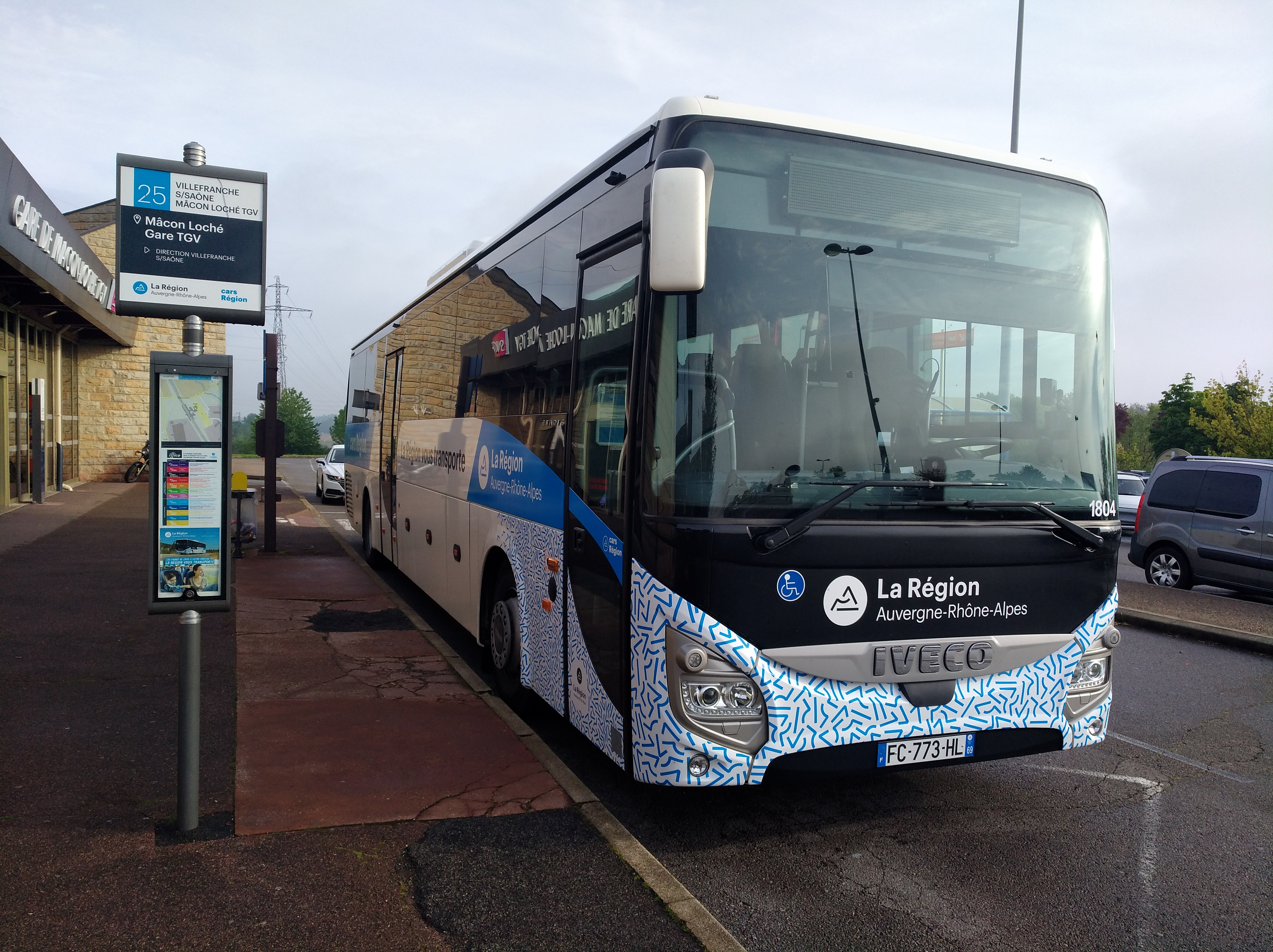 Autocar de la région Auvergne-Rhône-Alpes stationné devant la gare de Mâcon-Loché TGV, en Saône-et-Loire.